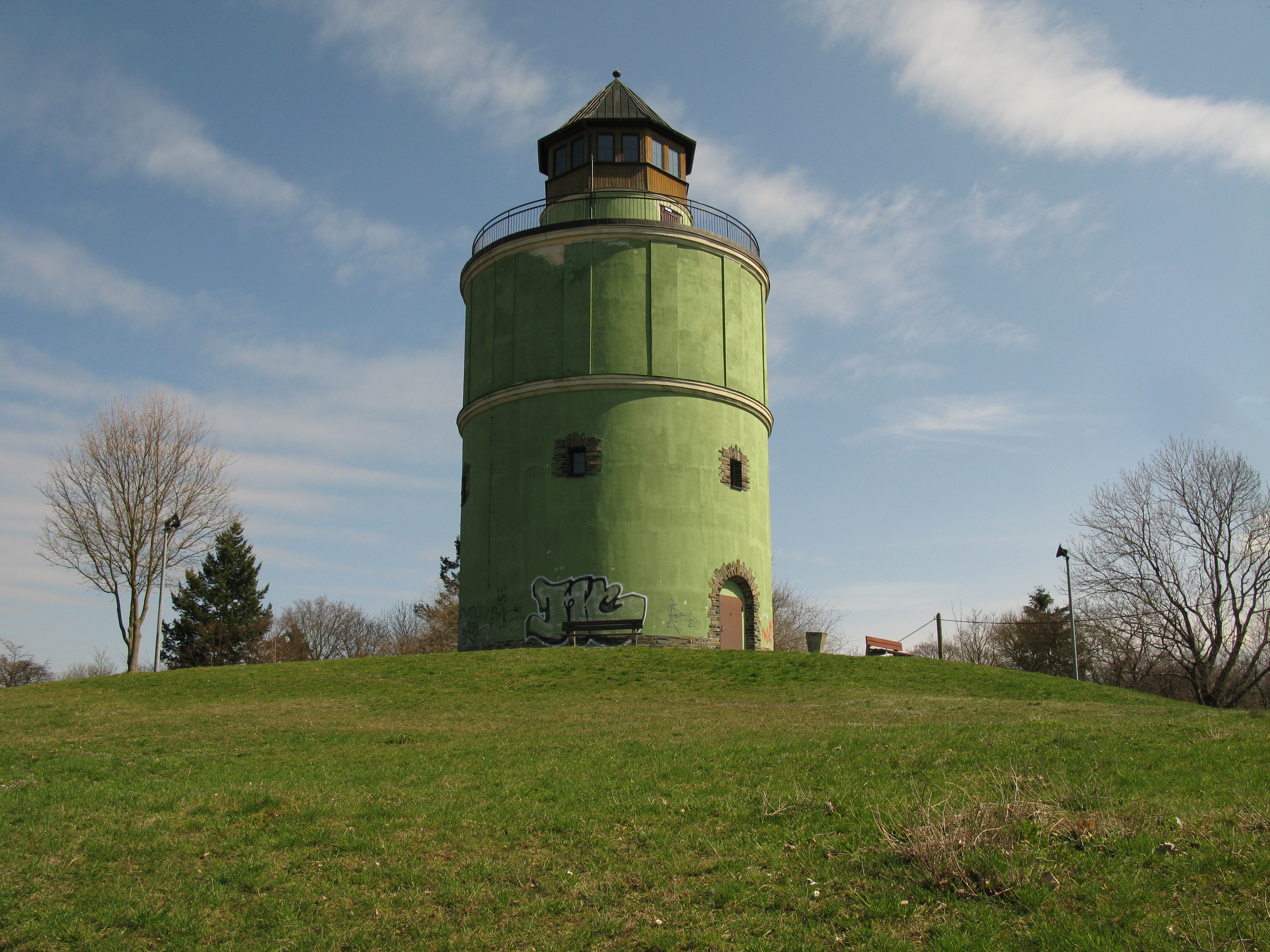 Plauen - der Wasserturm im Stadtteil Neundorf auf dem Warthübel.